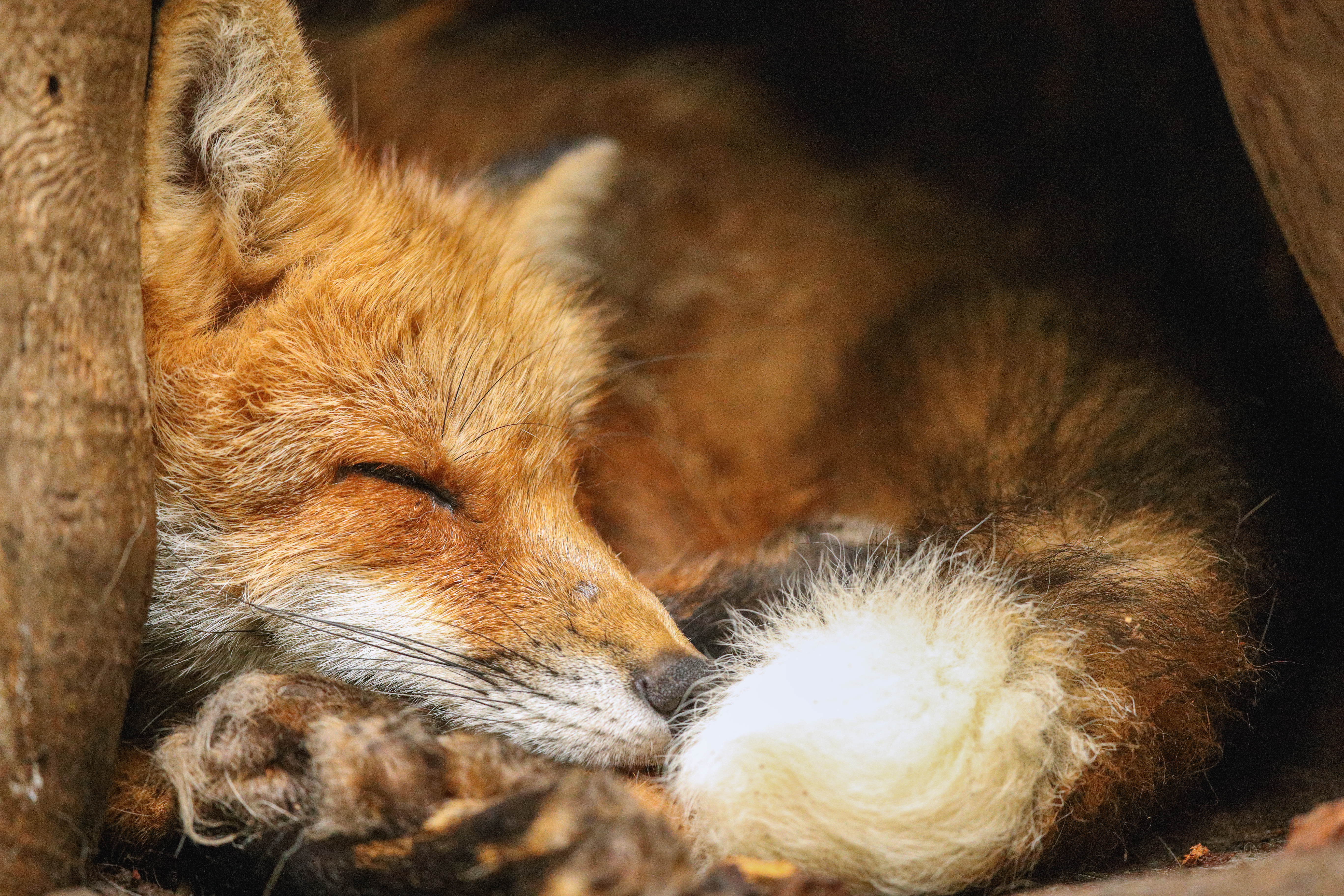 蔵王キツネ村で撮影されたアカギツネ 夜行性のため寝ている個体が多い